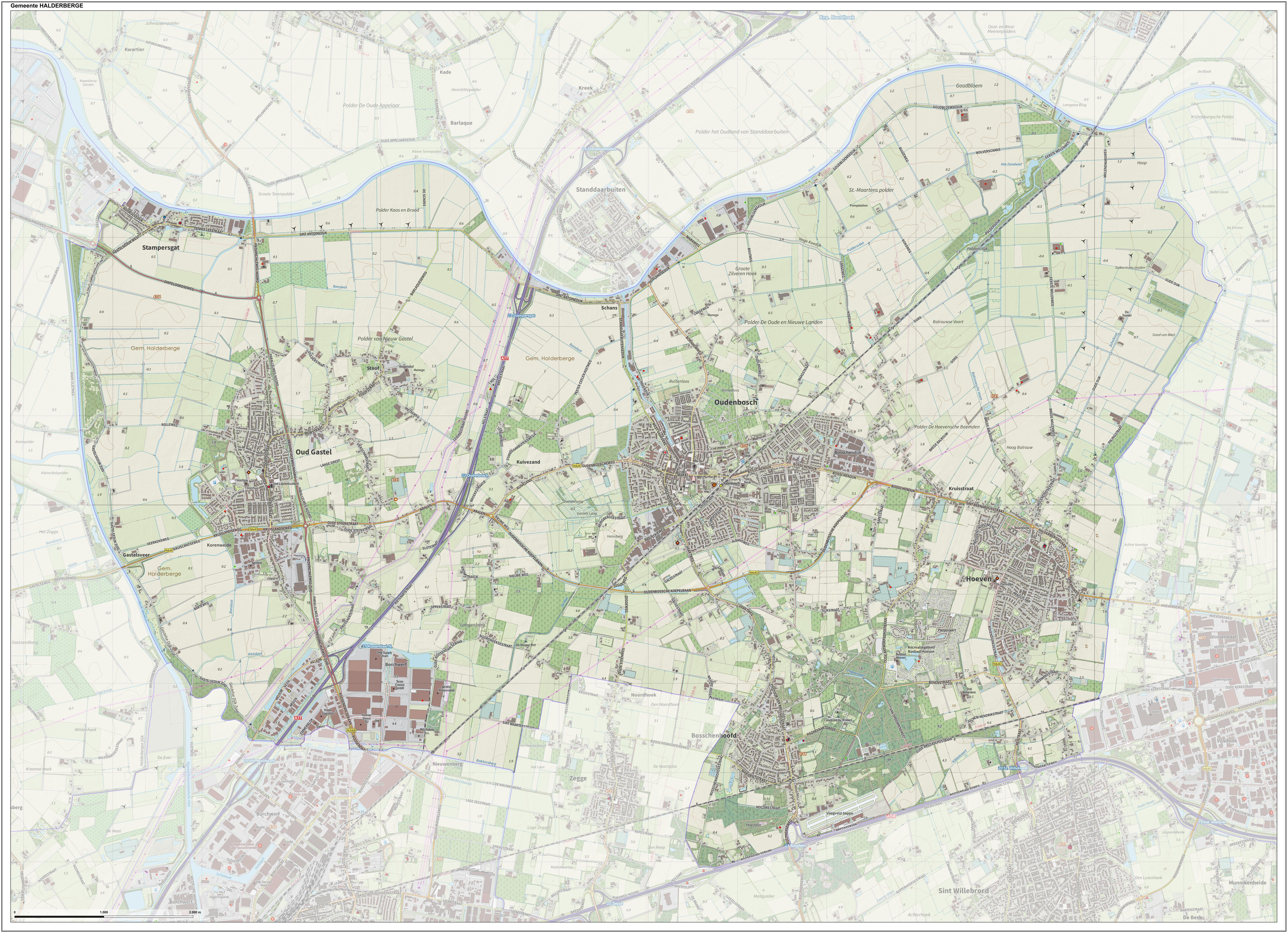 Topografische gemeentekaart. Resolutie: 400 pixels/km. Kaartbeeld samengesteld uit de open geodata van de Top10NL en Top25namen (Kadaster), Creative Commons-BY licentie. Gebouwvlakken uit open geodata BAG extract. Wegen uit de OpenStreetMap, OpenStreetMap community. Reliëfschaduw uit de Actuele Hoogtekaart AHN2. Samenstelling en kleurenschema: Jan-Willem van Aalst, met QGIS. Zie ook de Legenda.